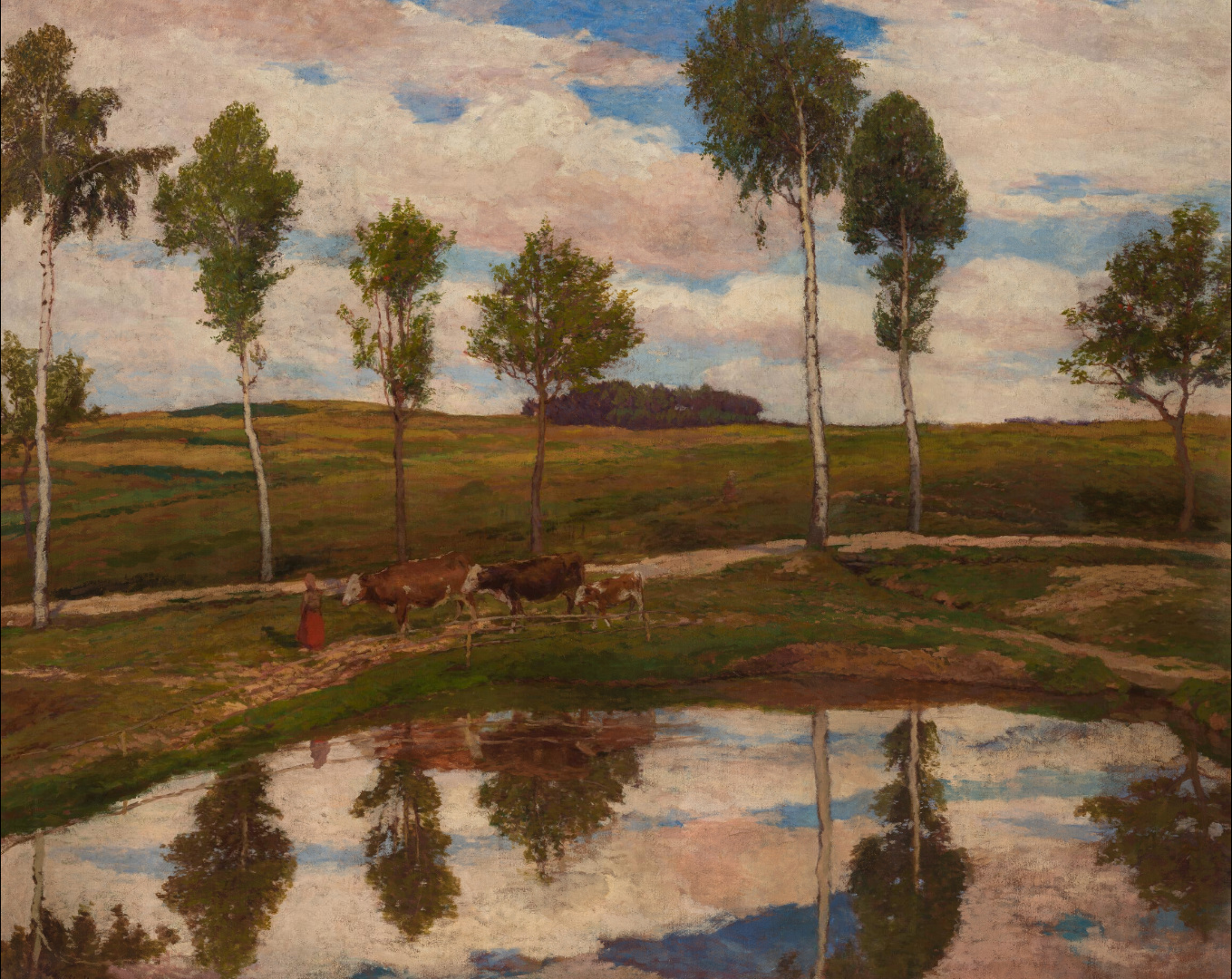 U nás v Kameničkách (1904), olej, plátno, 166 x 192 cm